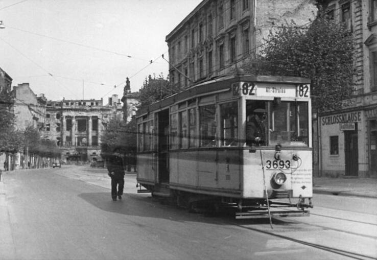 ADN-ZB-Keilhaus Nl-Schm Berlin 1950: Die 82 fährt wieder Am 9.5.1950 nahm die BVG die Strassenbahnlinie 82 in Betrieb. Die 82 fuhr alle 20 Minuten von der Breitestrasse nach Alt-Stralau. Sie half damit den Werktätigen der Engelhardt-Brauerei der Stralauer Glashütte und des Osthafens ihr Ziel bequemer und schneller zu erreichen. 6444-50 9.5.1950